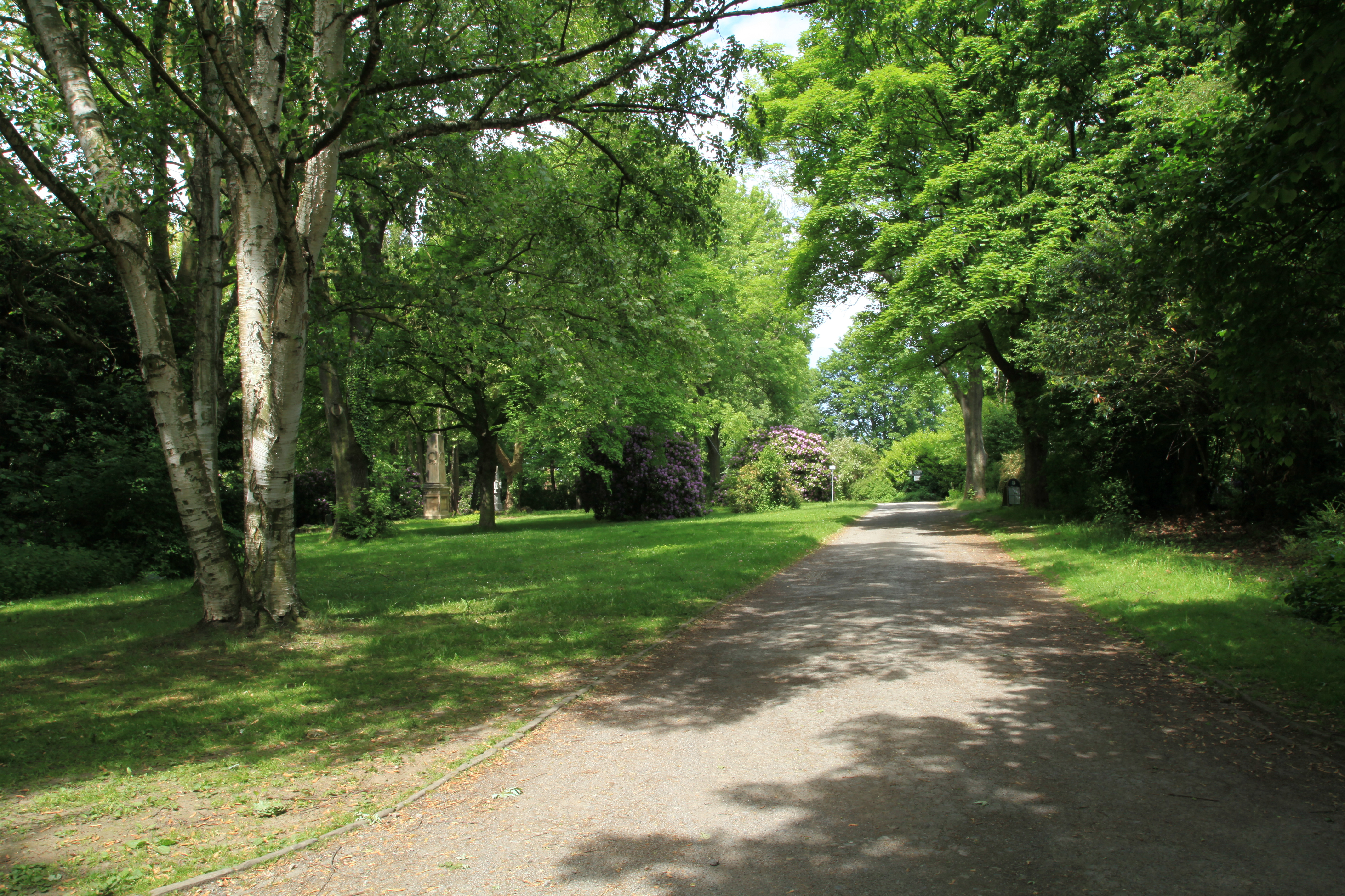 Kortumpark, Wittener Straße in Bochum